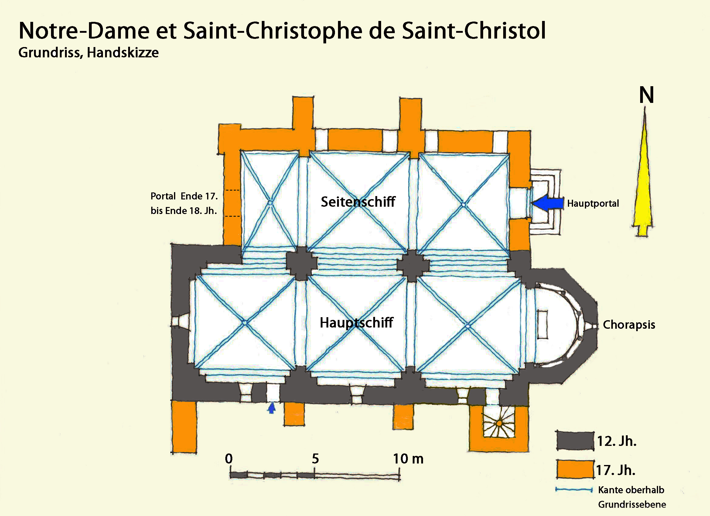 Notre-Dame et St-Christophe de St-Christolk, Grundriss, Handskizze